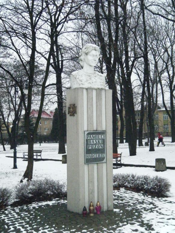 Pomnik Baśki Puzon w parku w Jarosławiu